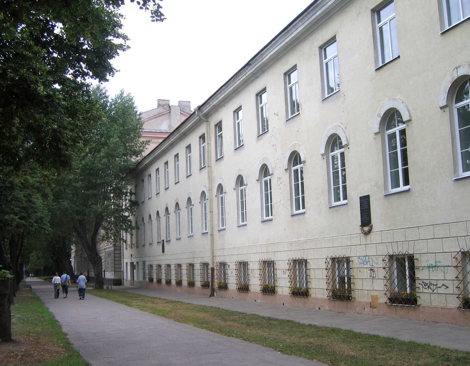 Autoriaus nuotrauka. 2006.07.29. Vilniaus universiteto gamtos mokslų fakultetas, Čiurlionio g. 21